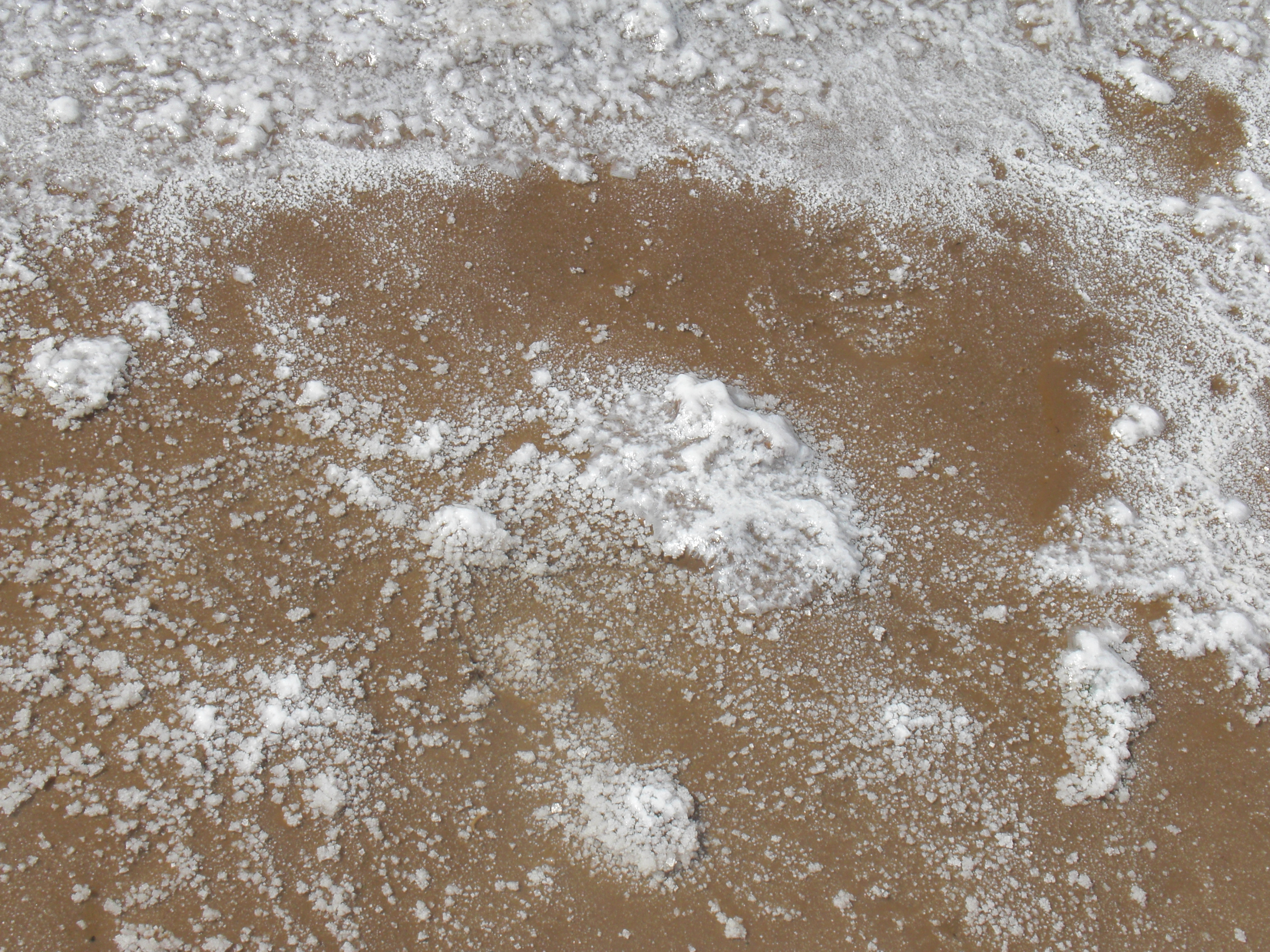 Соленое озеро Баскунчак, Ахтубинский район